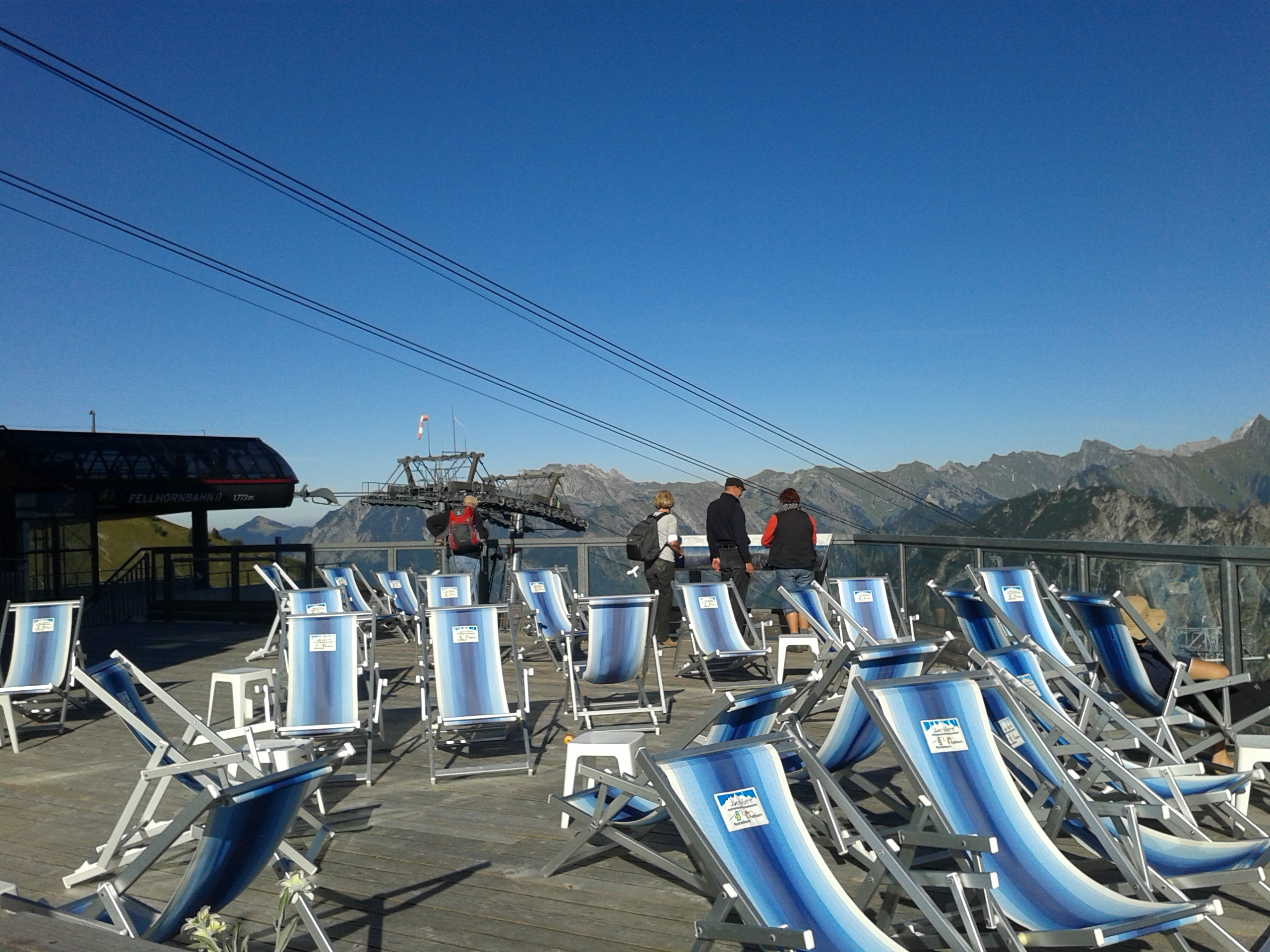 Fellhornbahn